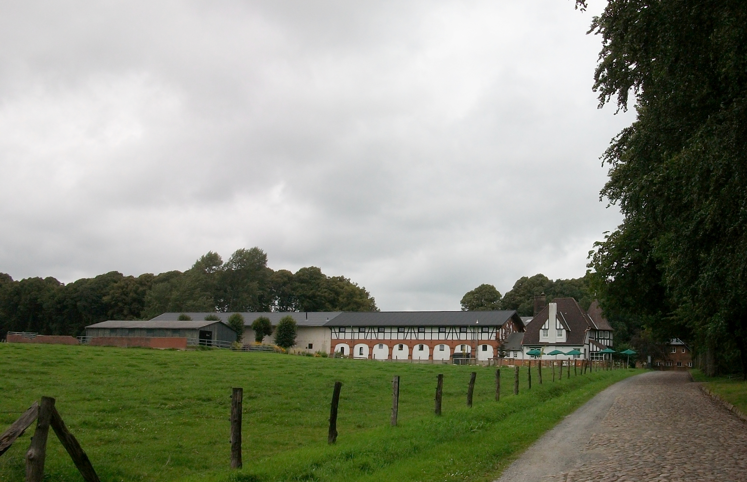 Wirtschaftsgebäude Rittergut Valenbrook, Fickmühlen im Landkreis Cuxhaven (Germany)